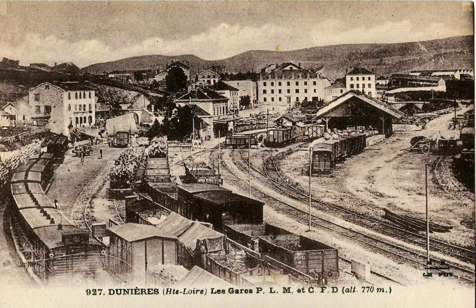 Carte postale ancienne éditée par MM au Puy, n°927 : DUNIÈRES - Les gares PLM et CFD